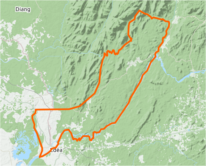 Limites communales de Edea 2 au Cameroun, OSM. This map may be incomplete, and may contain errors. Don't rely solely on it for navigation.